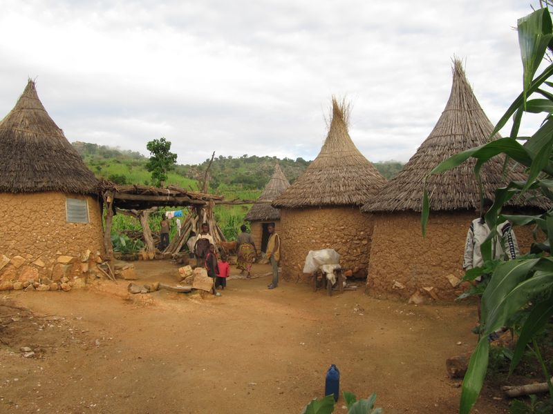 Intérieur d'une concessions à Magoumaz, au nord du Cameroun